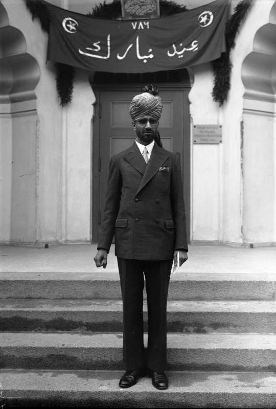 Die Feier des grossen Opferfestes I ´dul-Adha wurde von den Berliner Mohammedanern in der Moschee am Fehrbelliner Platz abgehalten. Der Iman der Moschee, Abdullah, leitete persönlich das hohe mohammedanische Fest. Der höchste Würdenträger der Mohammedaner in Berlin, der Iman Abdullah vor dem Eingang der Moschee am Fehrbelliner Platz in Berlin.